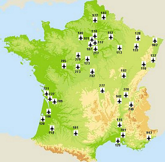 Carte des bases aeriennes de l'Armee de l'Air Map of french air force bases in France